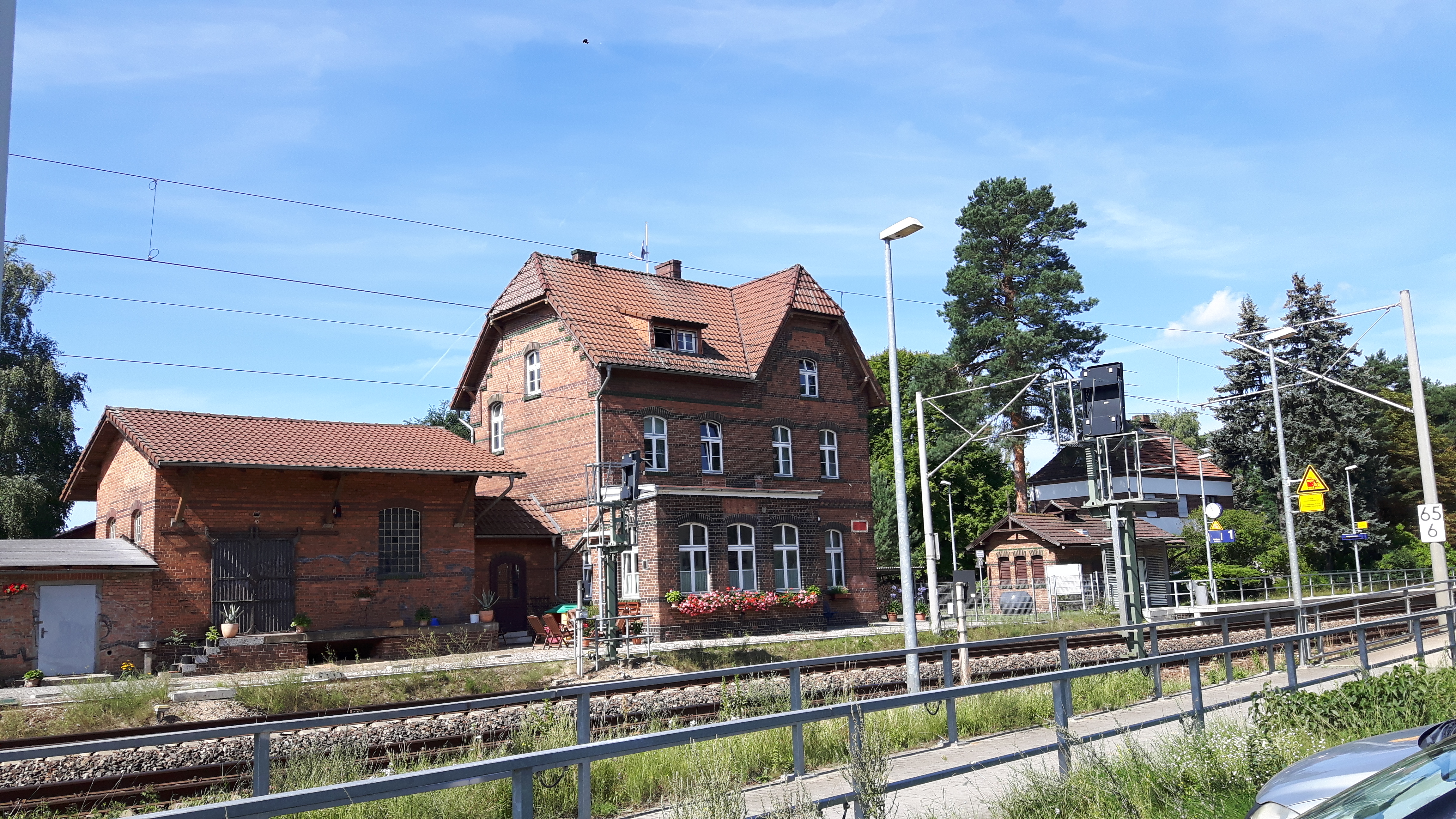 Bahnhof in Schönwalde an der Bahnstrecke Berlin-Görlitz.